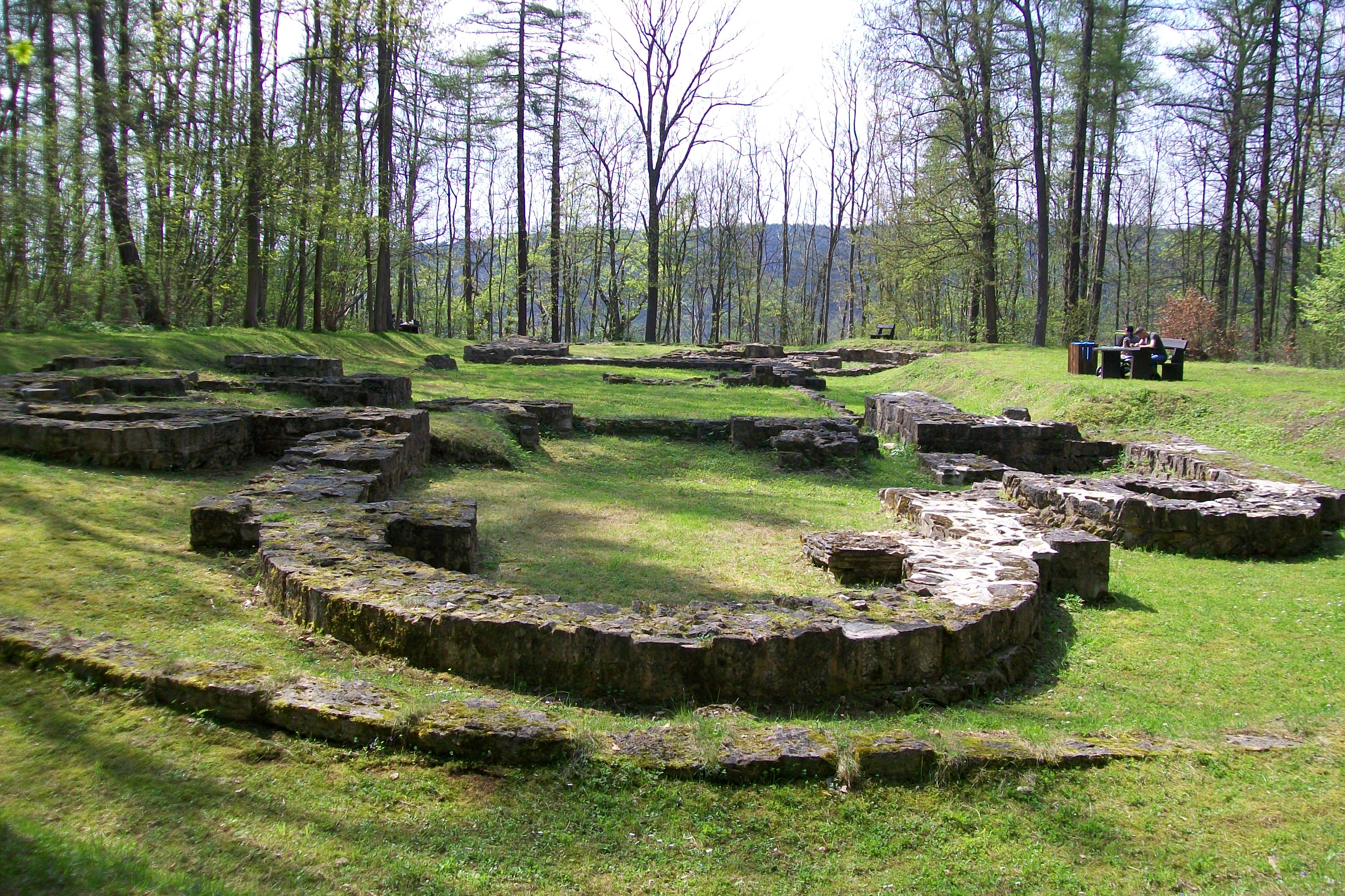 Ehemaliges Benediktinerinnenabtei Walpurgiskloster in Arnstadt.